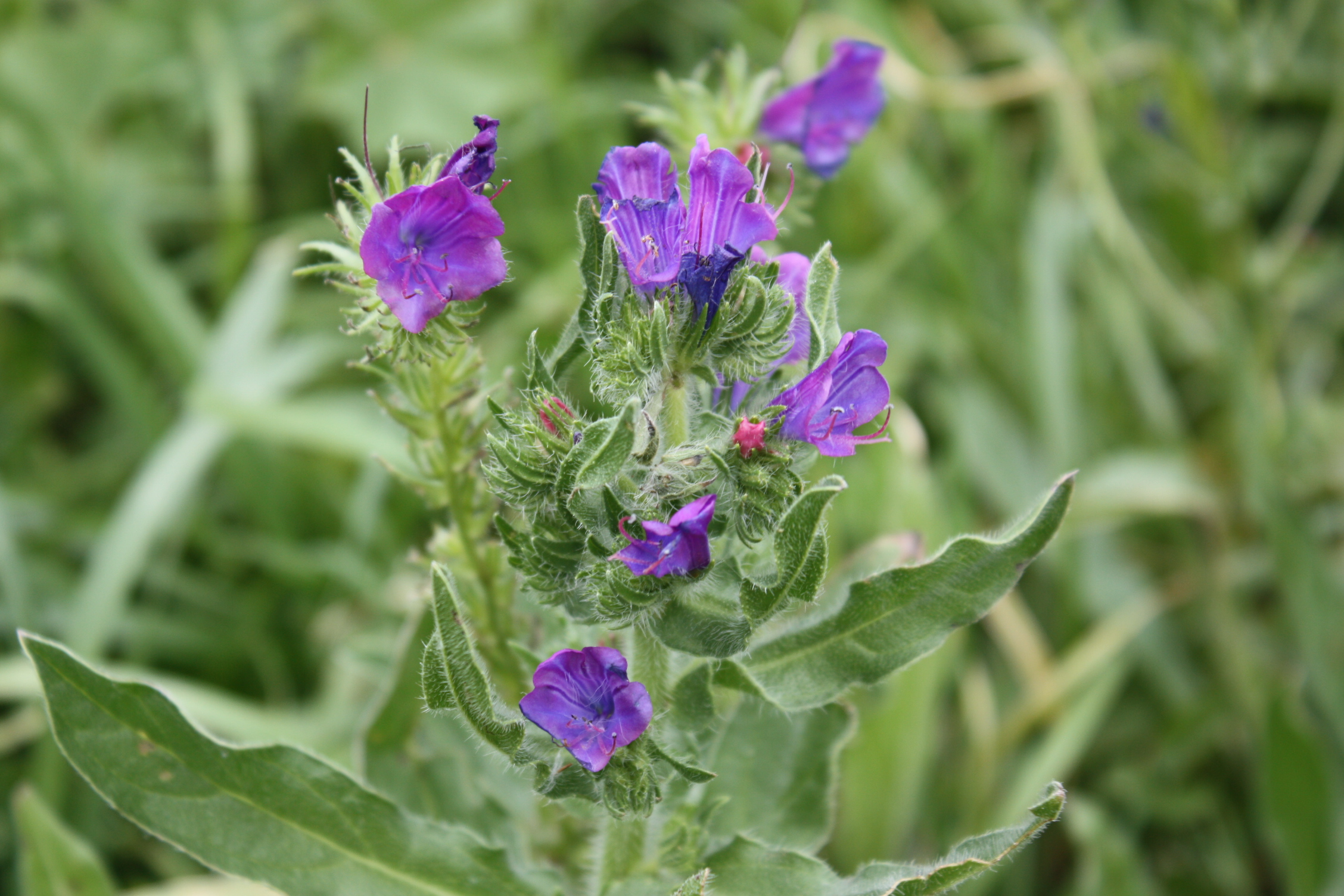 Echium plantagineum, auf Maderia